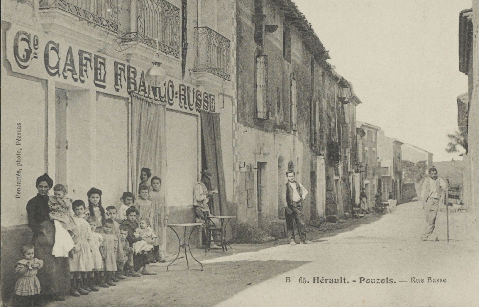 Pouzols. - Rue basse : carte postale (1ère moitié du XXe siècle)